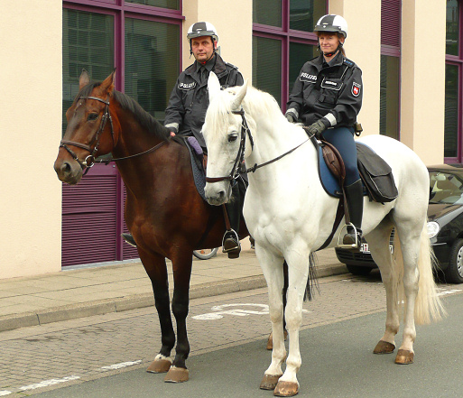 Polizeipferde Niedersachsen